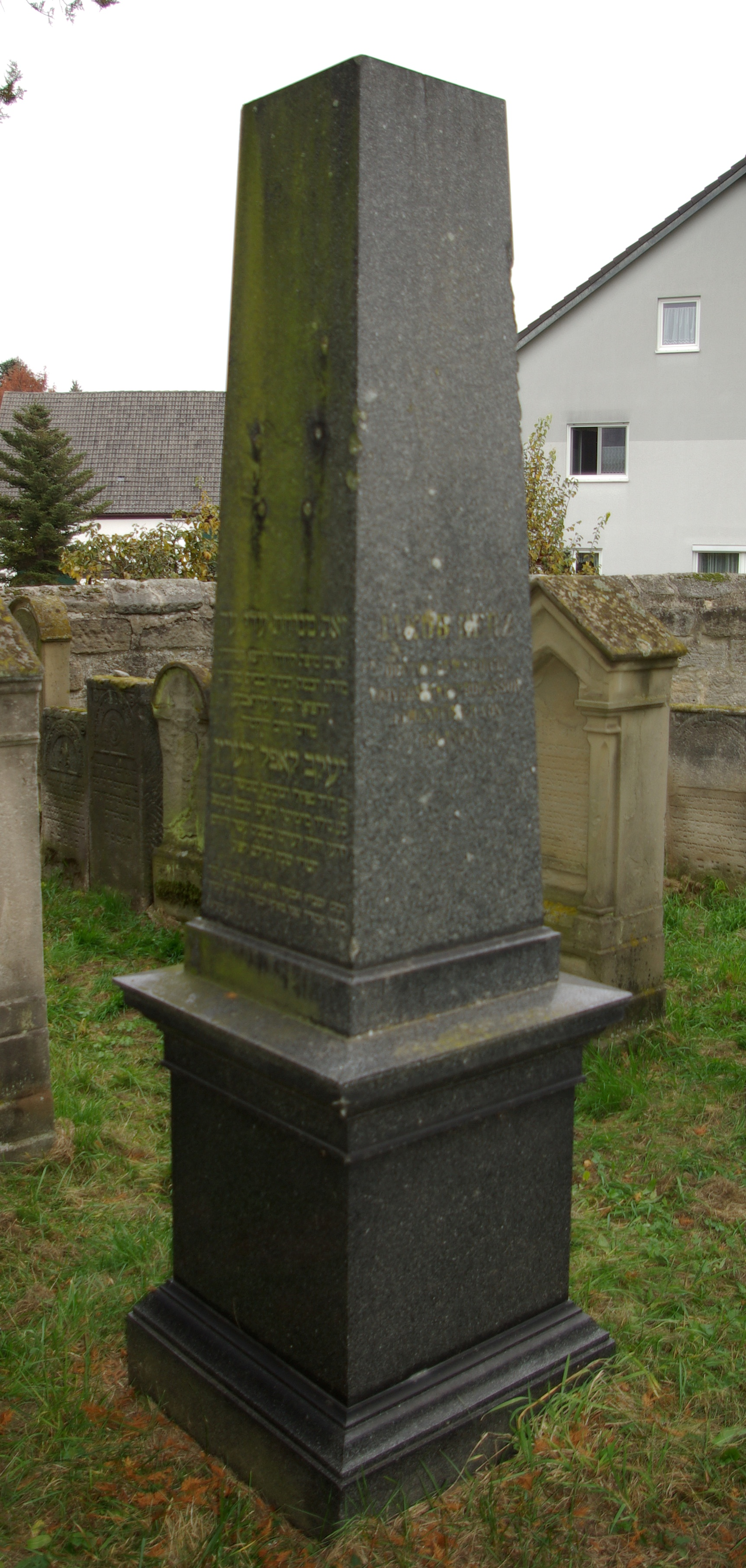 Jüdischer Friedhof in Baiersdorf. Grabmal von Jakob Herz (1816-1871)